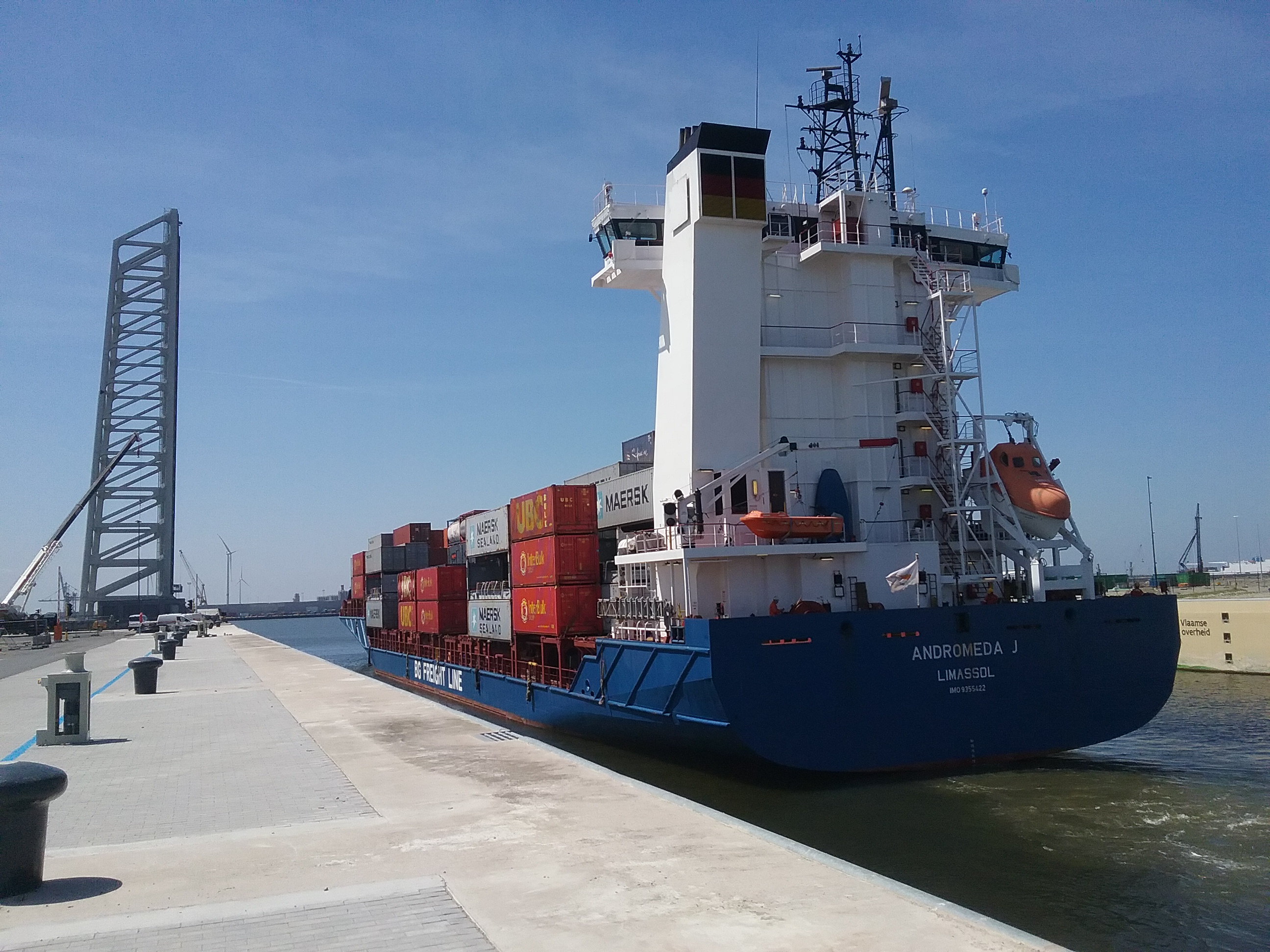 De Andromeda J is op 09/06/2016 het eerste Zeeschip dat door de Kieldrechtsluis gaat.